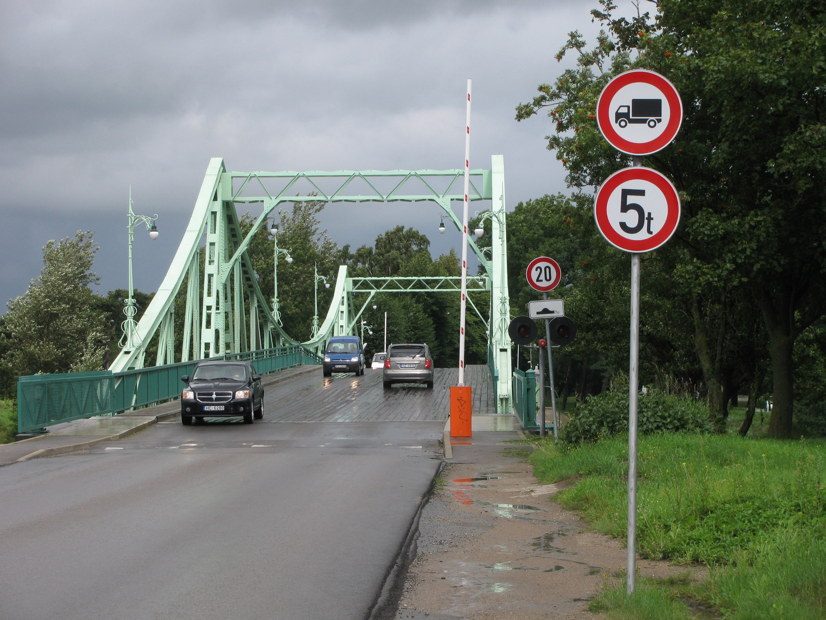 Dvojitý otočný most Oskara Kalpaka spojující bývalý vojenský přístav Karosta se Severním předměstím, Liepāja, Lotyšsko. Vybudován roku 1906, nosnost je pouze 5 tun. Pohled z jižního břehu.